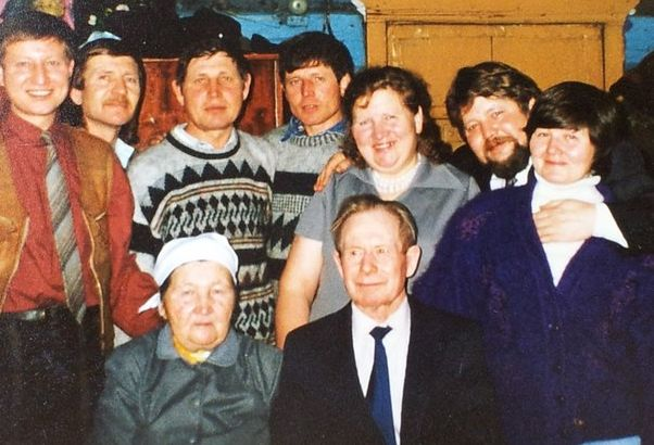 Семья Козловых в сборе